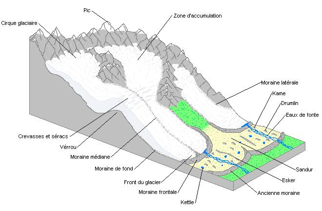 Schéma d'un glacier et des formations glaciaires (moraines,...)